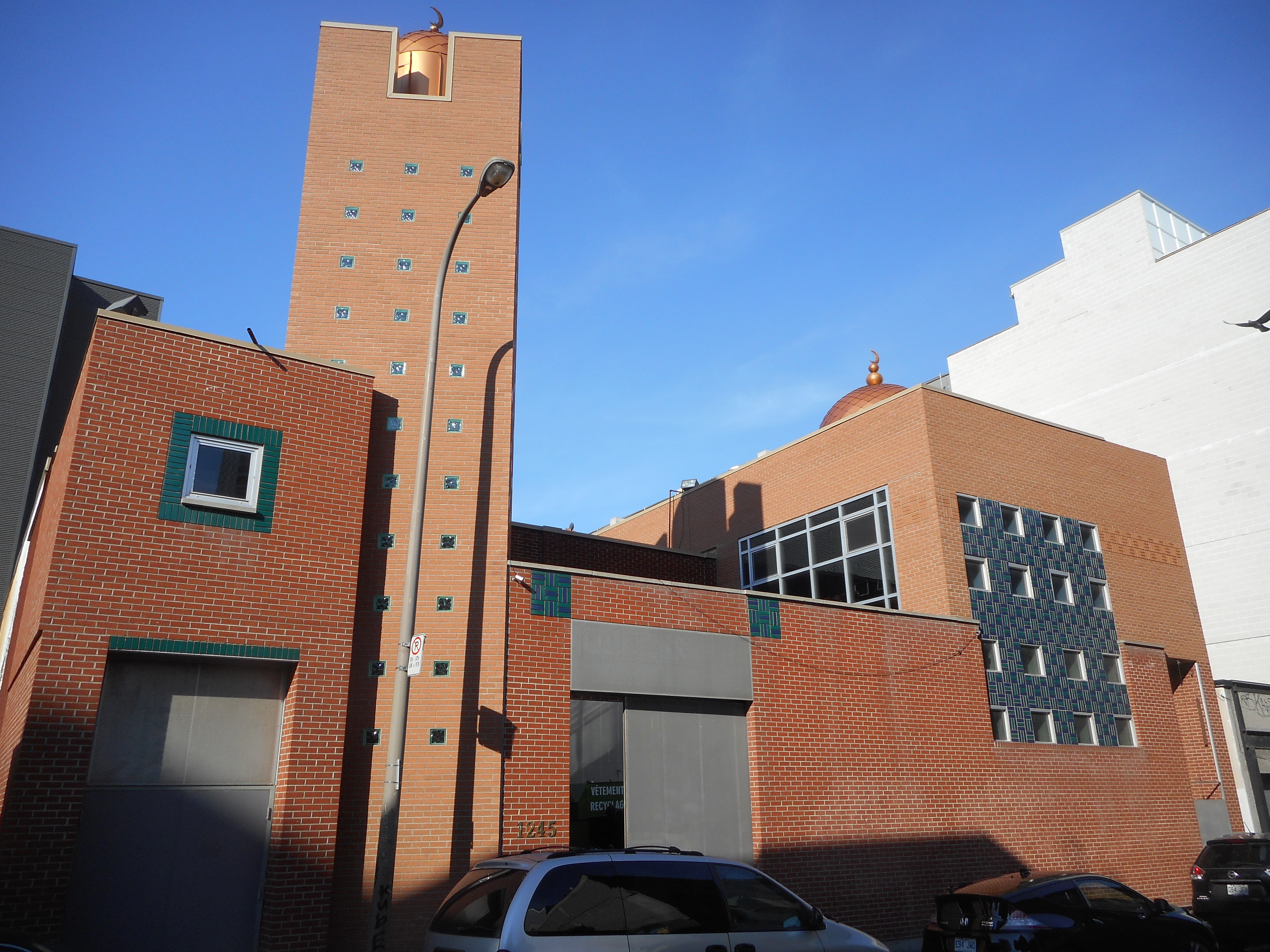 Mosquée Al-Omah Al-Islamiah, 1245, rue Saint-Dominique, Montréal